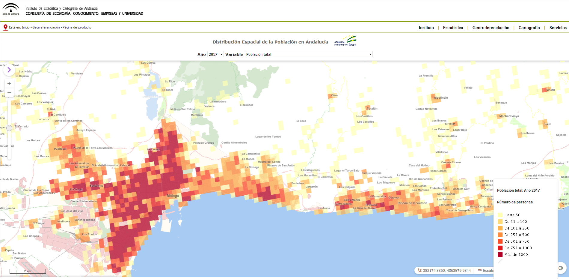 Imagen del visor de la Distribución Espacial de la Población en Andalucía